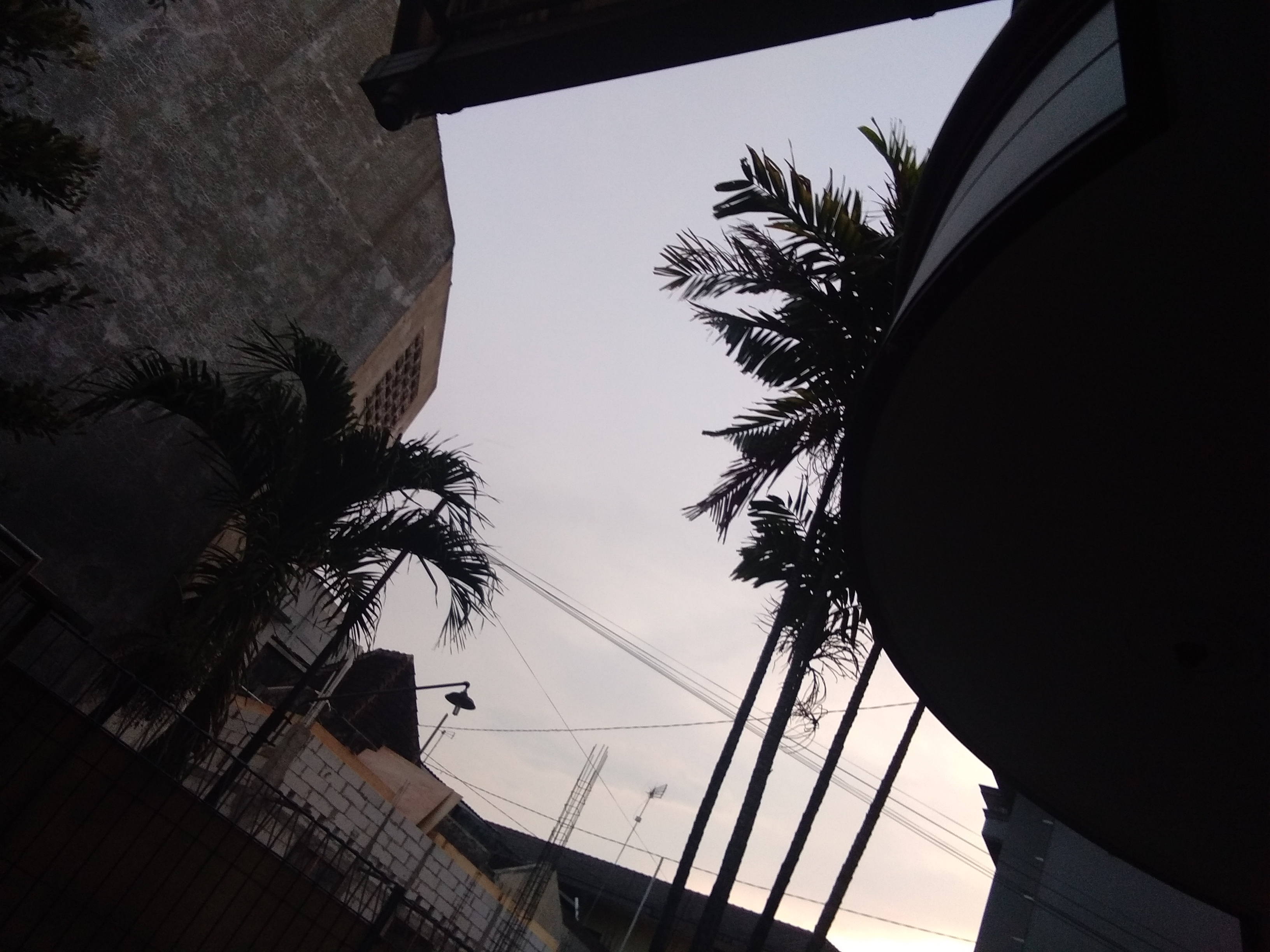 Basa Jawa: Sore iku aku lungguh ngarep kos nunggu kancaku sing ora metu-metu nganti maghrib uga ora ndnag metu. Tibake kancaku lagi turu.